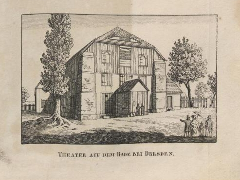 Theater auf dem Bade bei Dresden (Linckesches Bad, errichtet 1764 neben der Mündung der Prießnitz in die Elbe), Sommertheater seit etwa 1776, eine der Wirkungsstätten Carl Maria von Webers in Dresden), Kupferstich